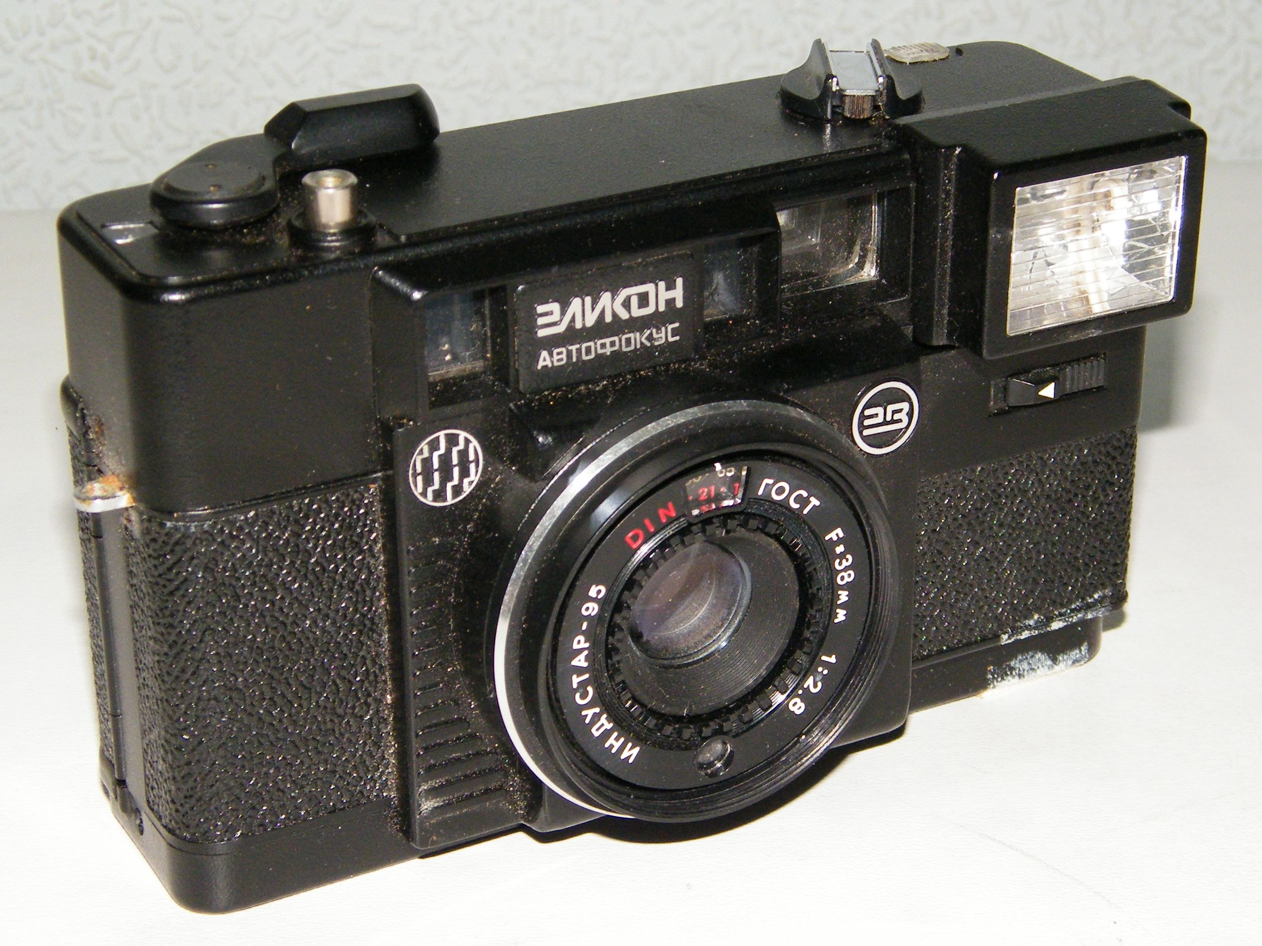 Фотоаппарат "Эликон-автофокус" - первый советский автоматический фотоаппарат с автофокусировкой. БелОМО, Минск, вторая половина 1980-х годов.